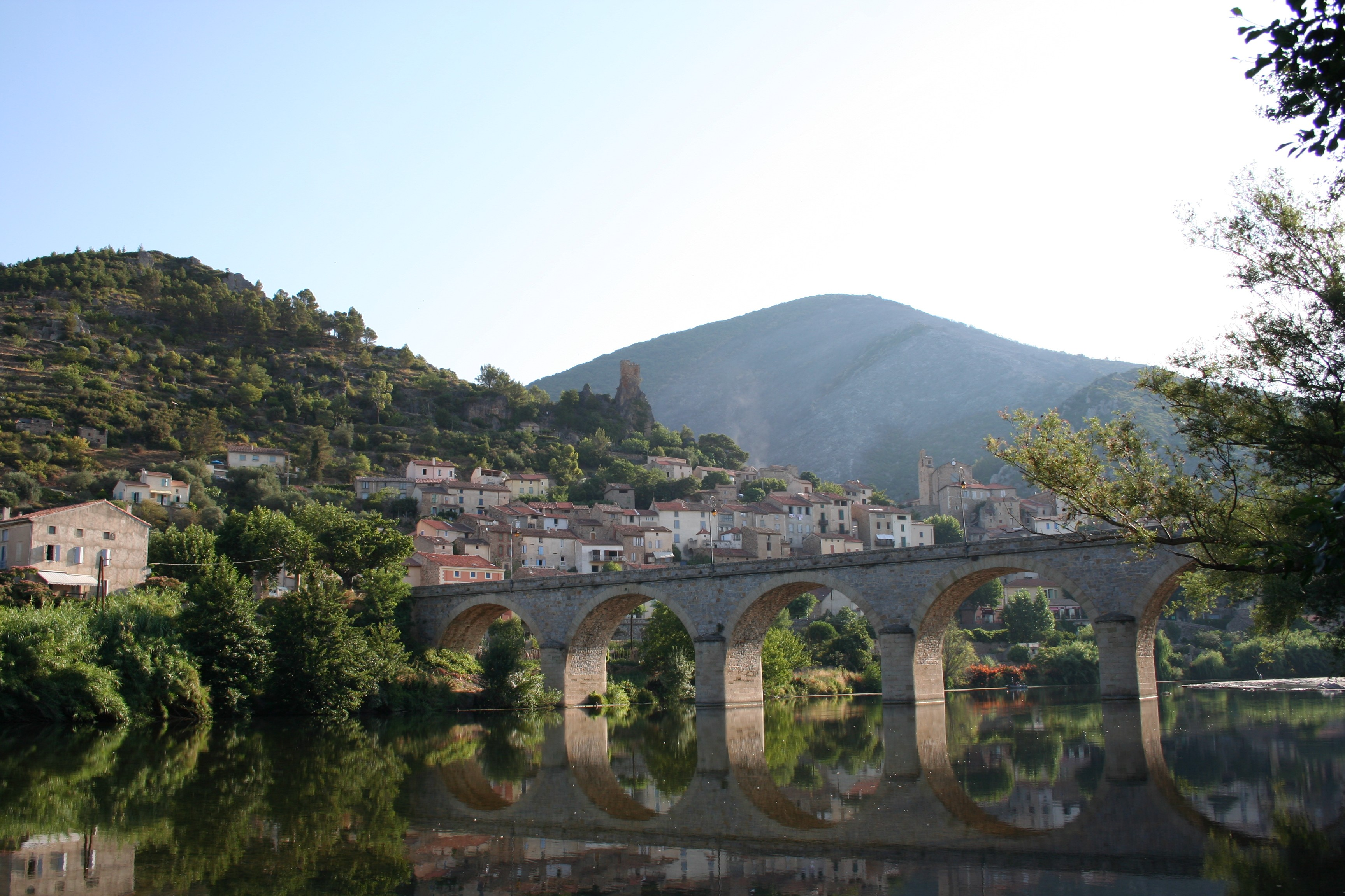 Roquebrun, vue d'ensemble, photographie prise au bord de l'Orb, Hérault, France.